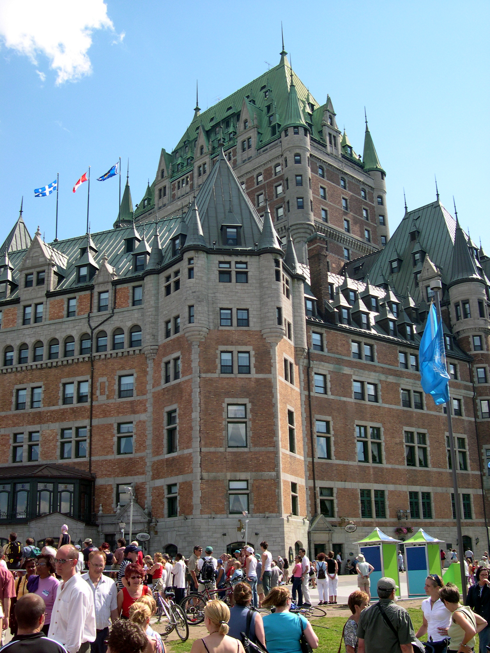 Chateau Frontenac